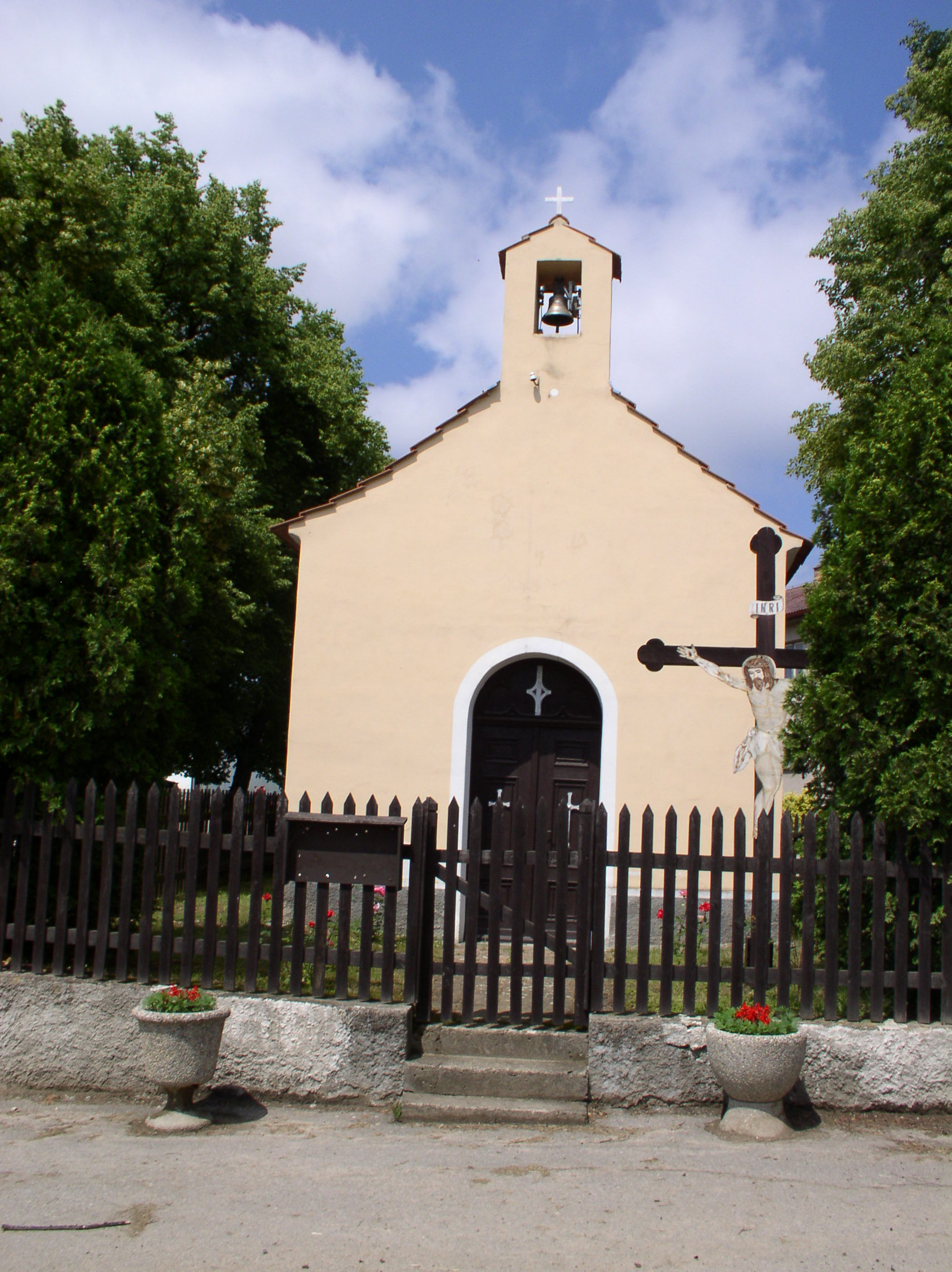 Dobřejovice u Hosína